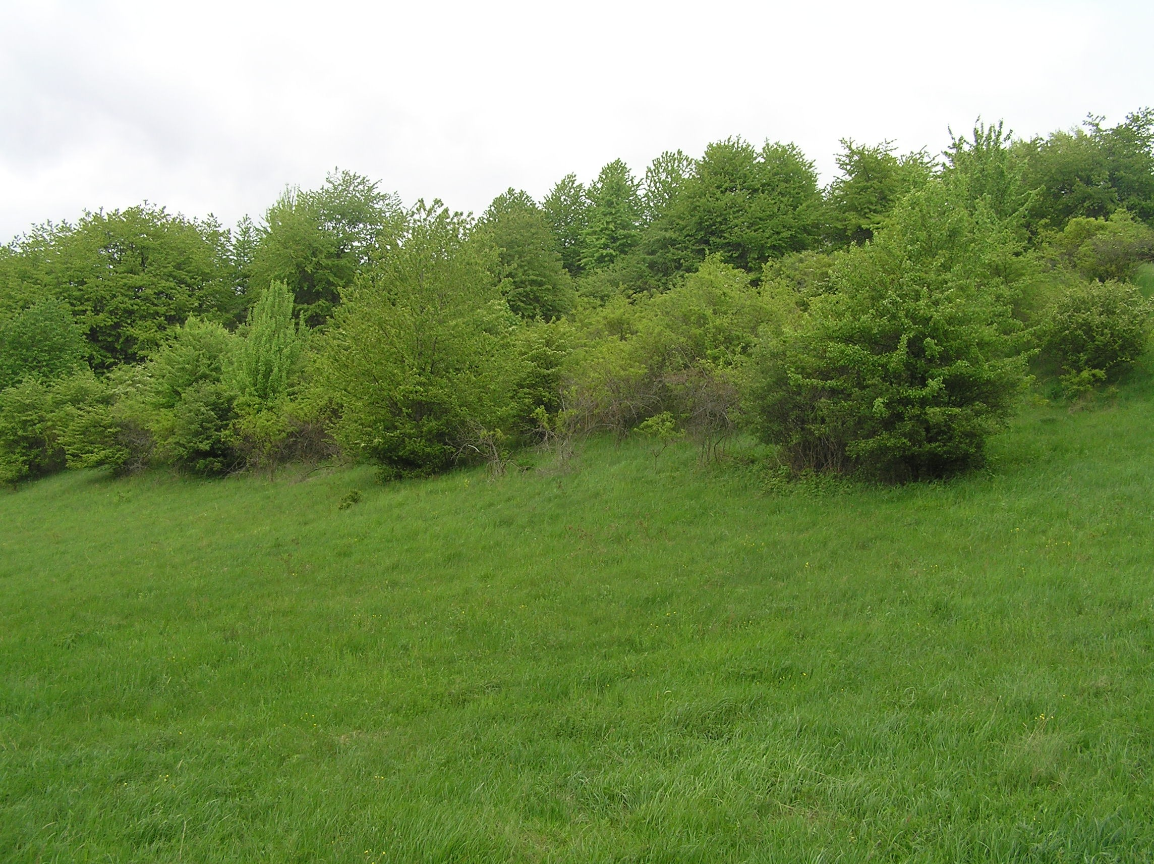 The Javoří hory Mountains